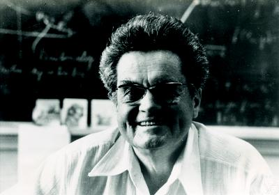 Foto di William Mann